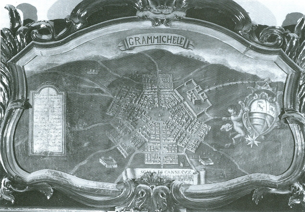 Pianta settecentesca di Grammichele conservata a palazzo Butera, Palermo.